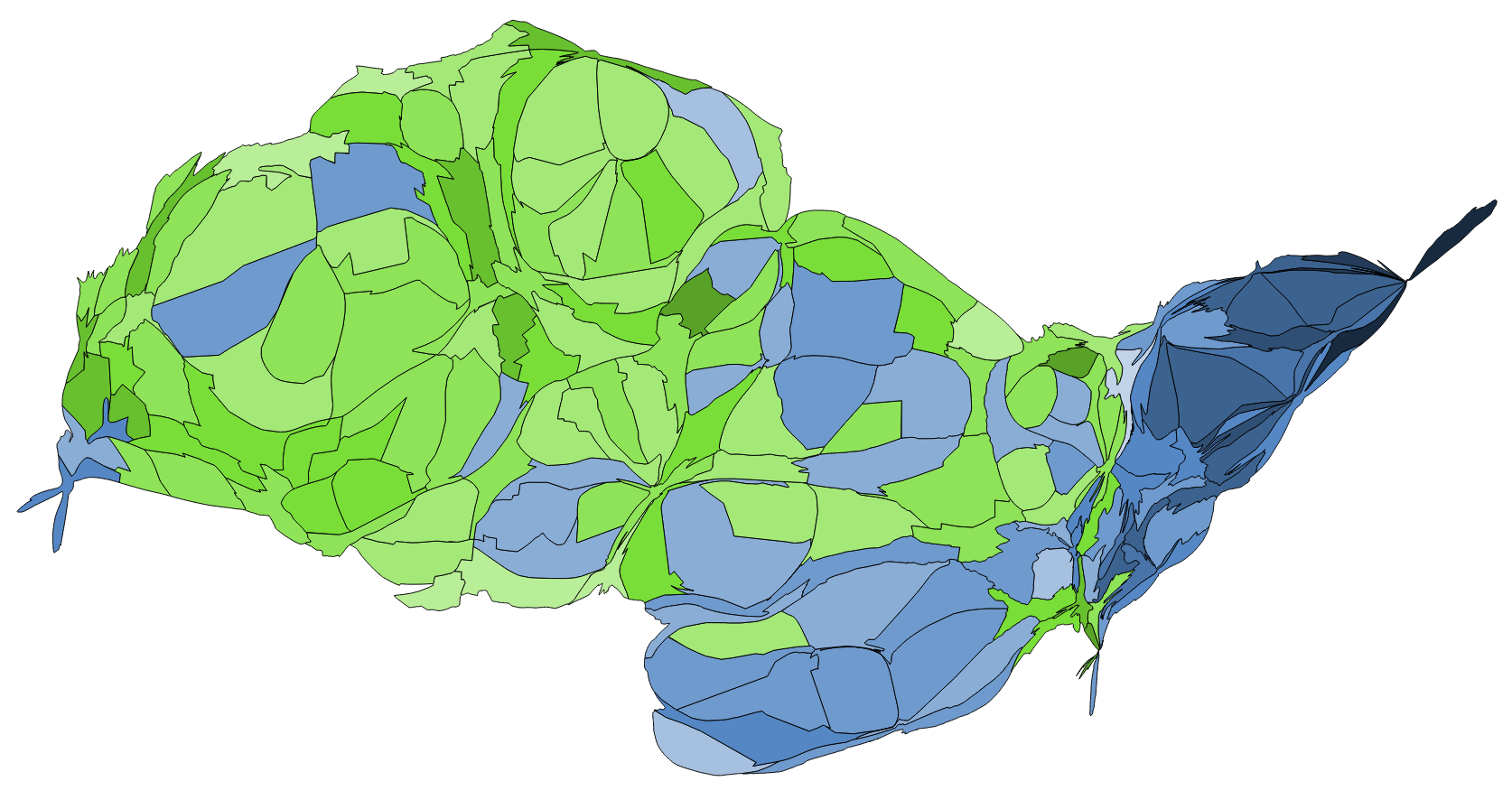 中文（台灣）: 顏色對照表